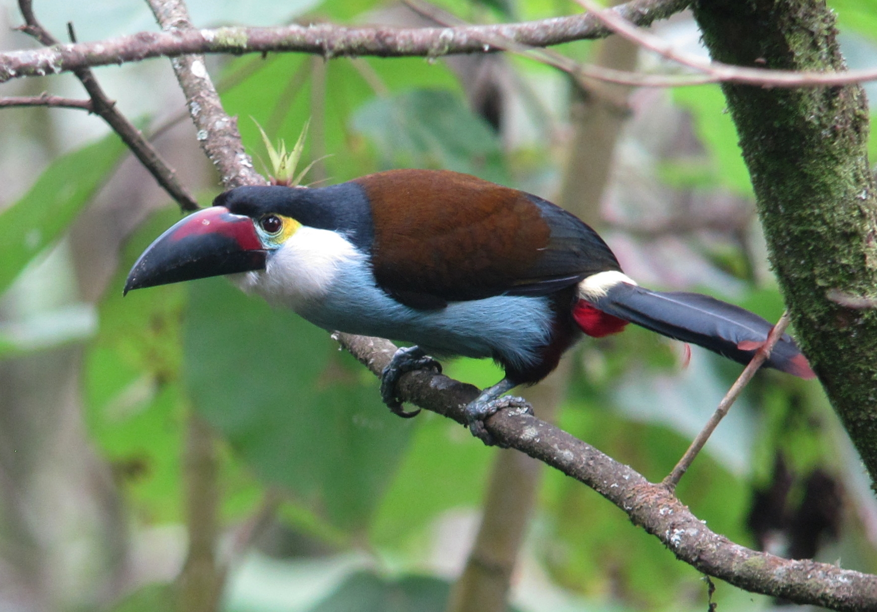 Manizales, Caldas, Colombia